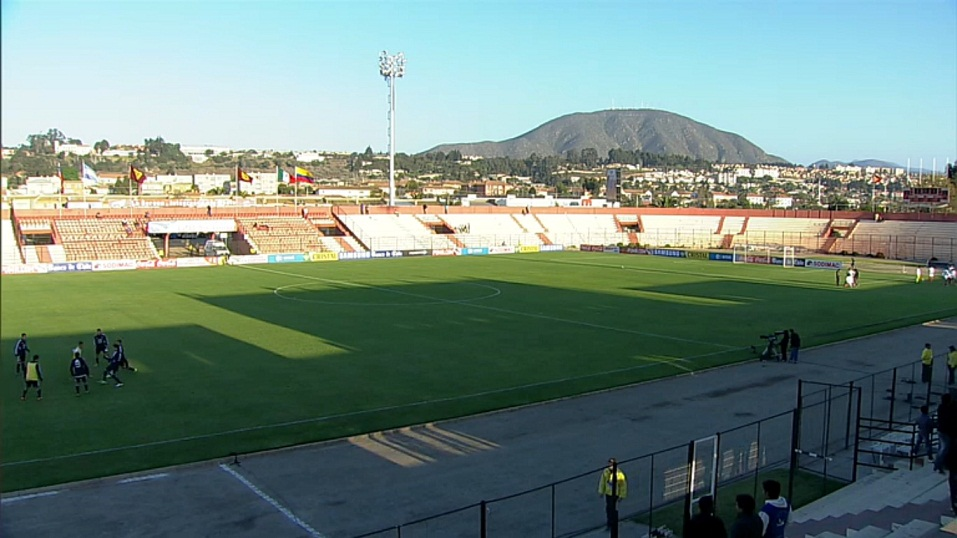 Estadio La Portada en el cuadrangular Sub-20